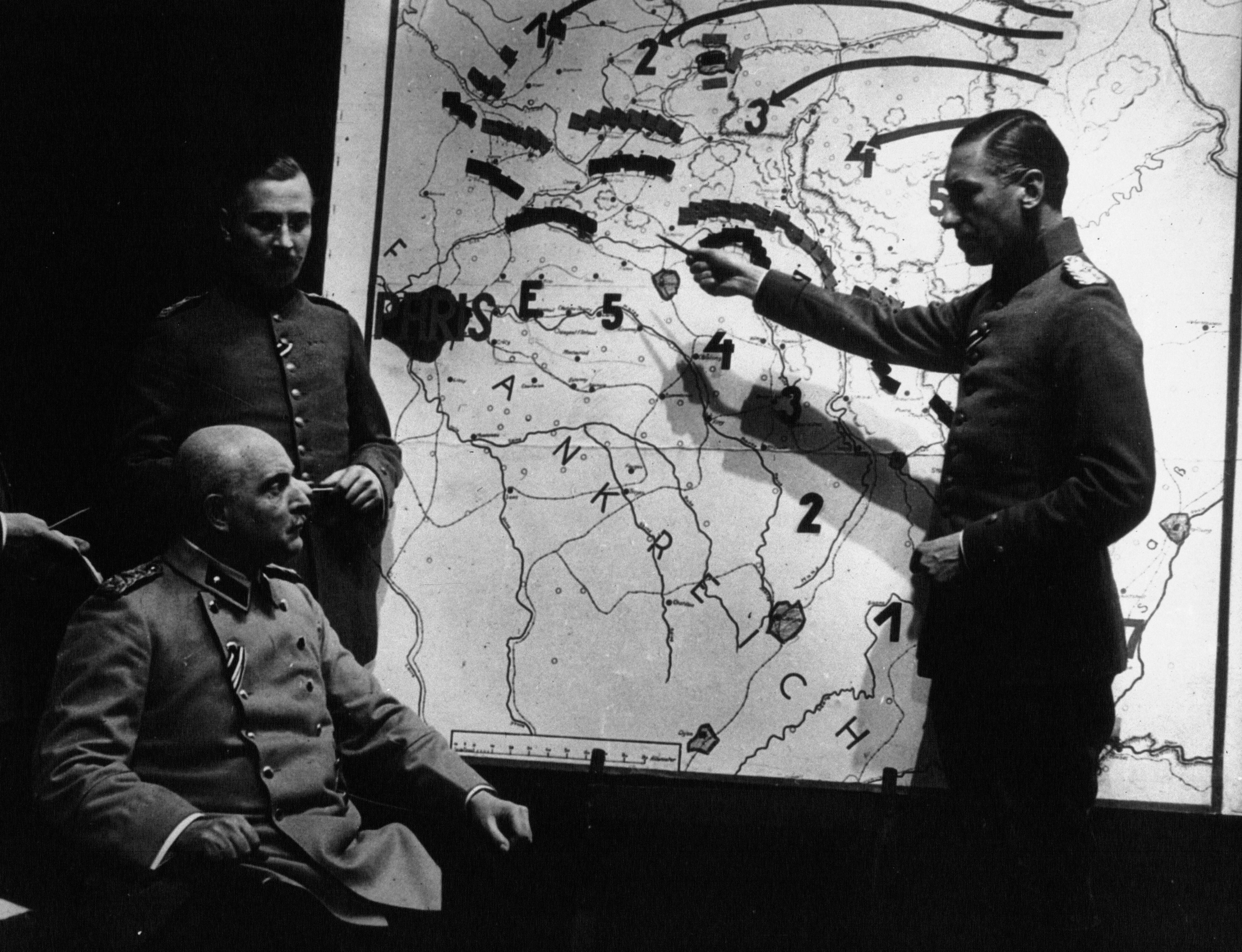 Une scène de la pièce La bataille de la Marne jouée à Berlin : le général von Moltke assis (agence photo Robert Sennecke Internationaler Illustrations Verlag, diffusé à Paris par l'Agence Mondial).